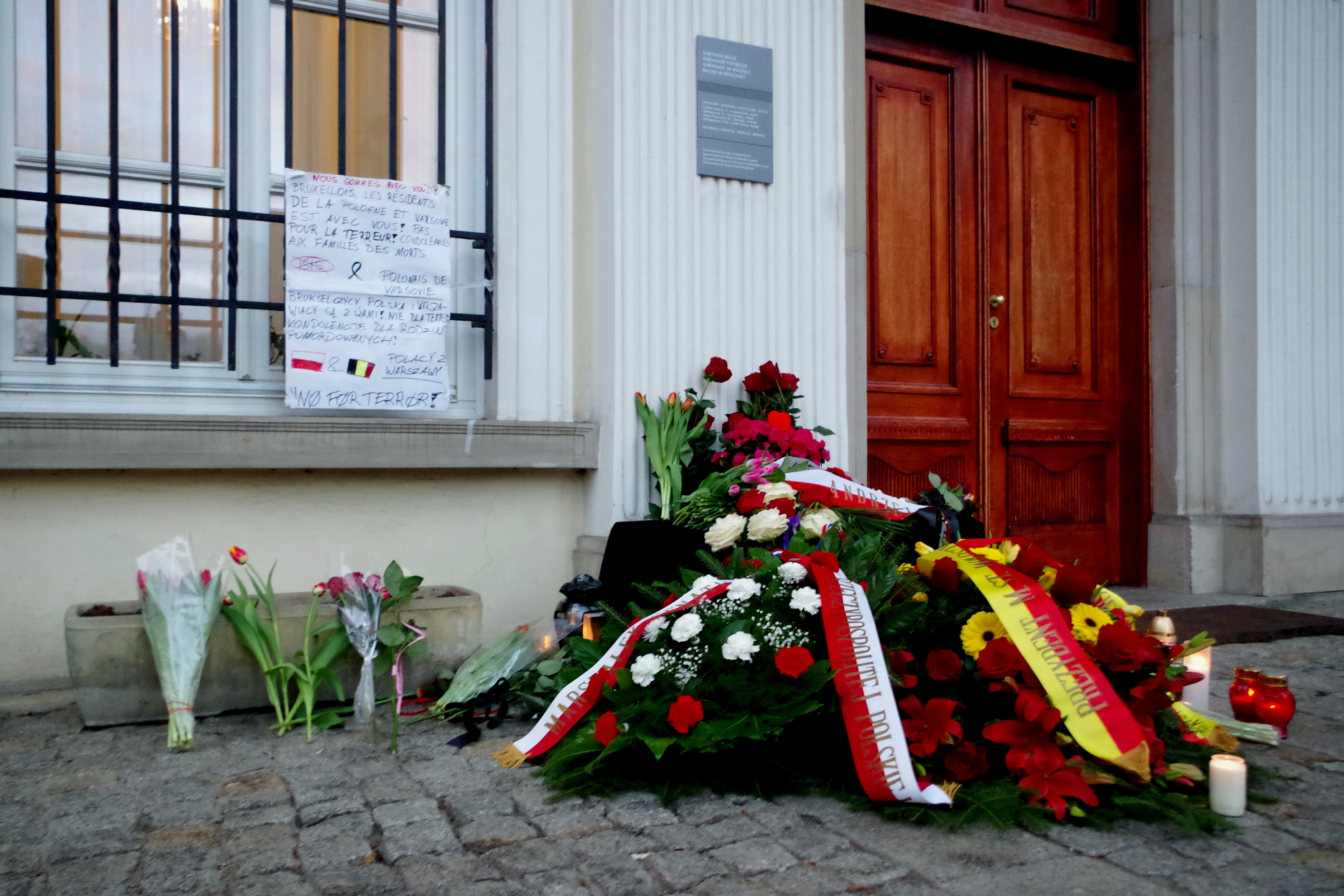 Kwiaty oraz znicze pod Ambasadą Królestwa Belgii w Warszawie po zamachach w Brukseli z 22 marca 2016.